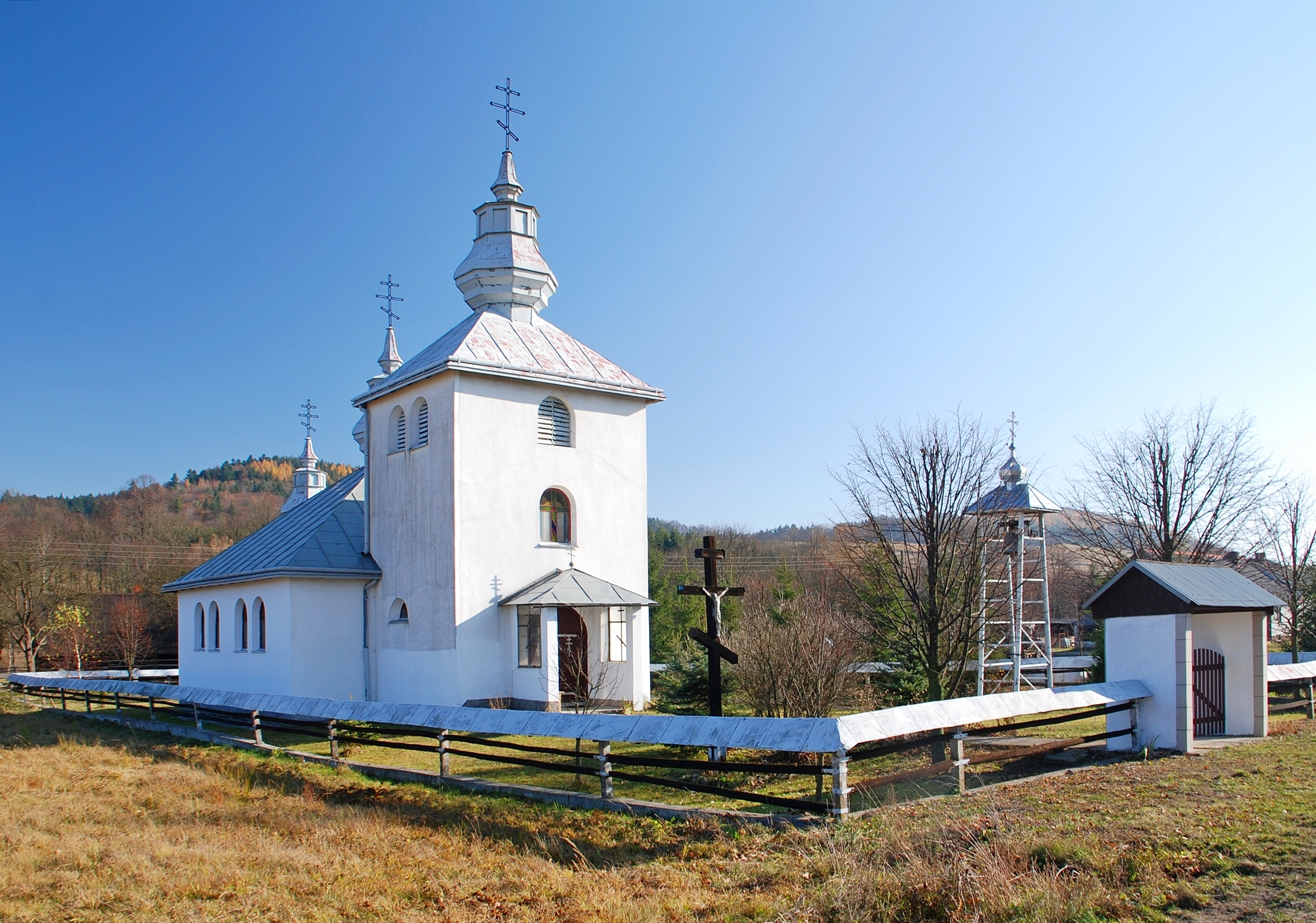 wieś Zyndranowa